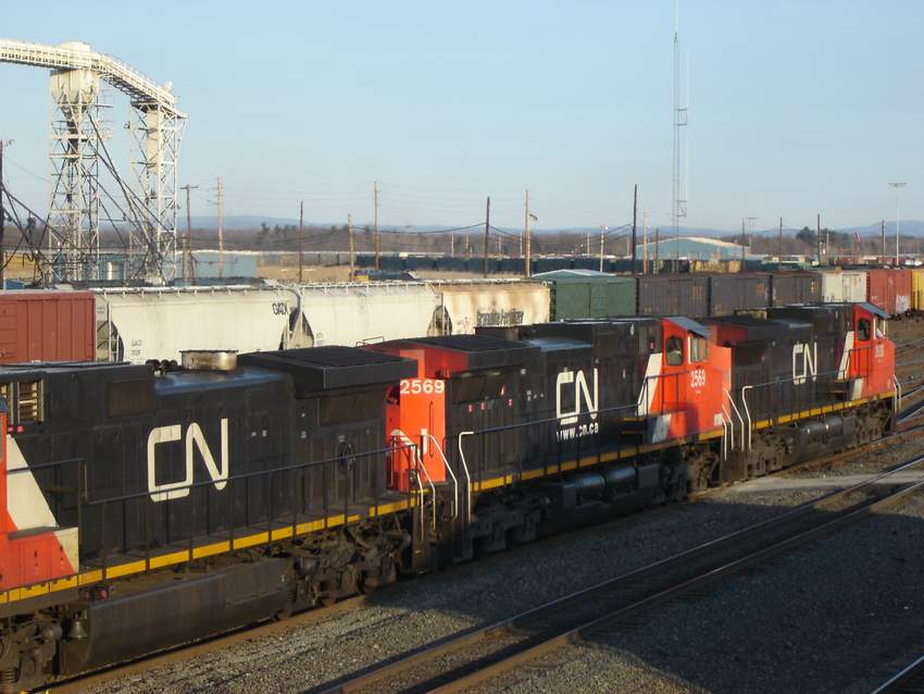 CN Dash 9-44